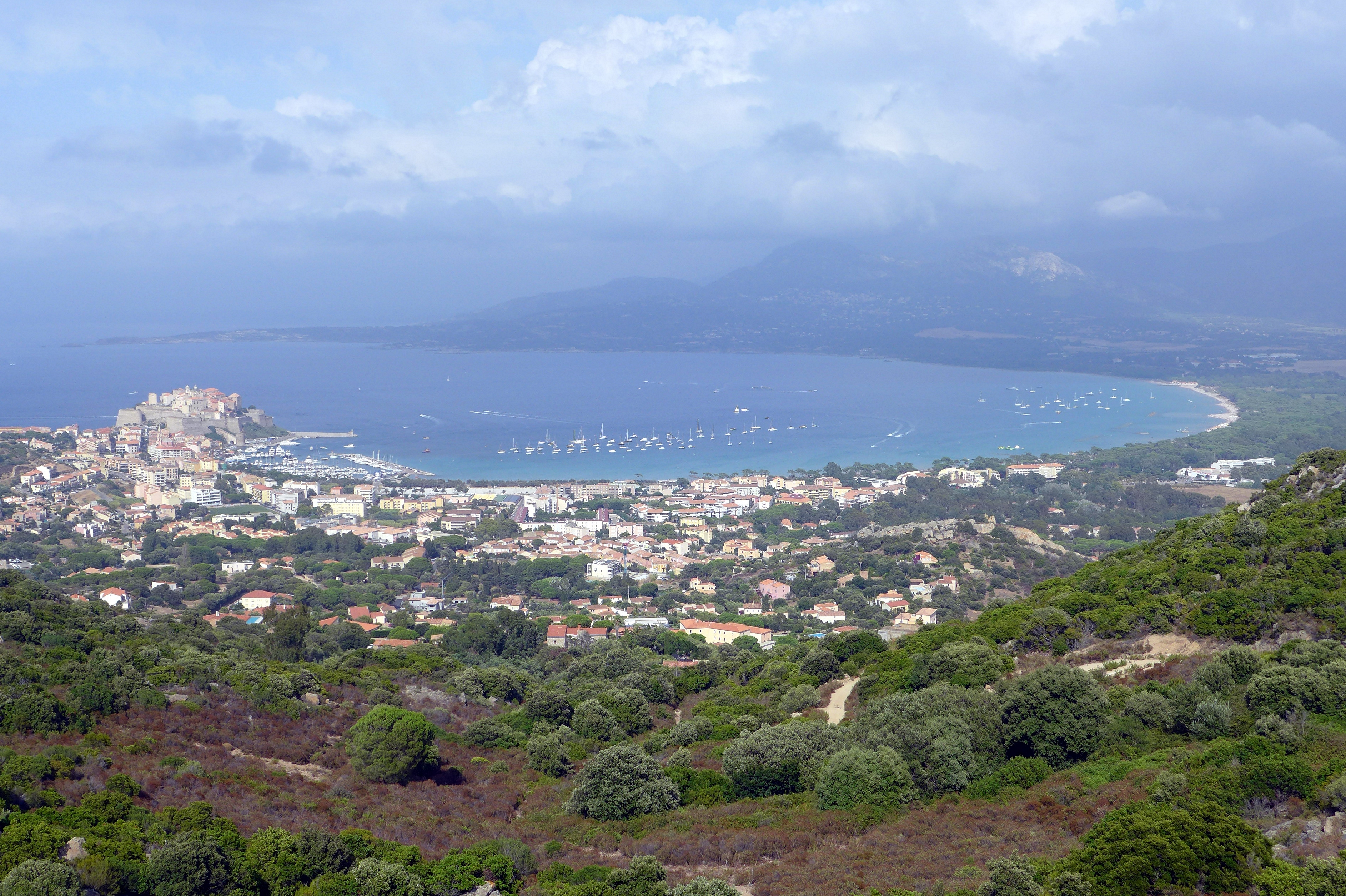 Bucht von Calvi, Blick von Notre-Dame de La Serra